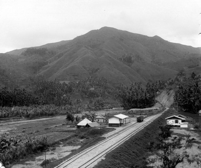 Negatif. Halte Si Loengkang (Silungkang), bagian dari jalur Solok-Silungkang di pesisir barat Sumatera